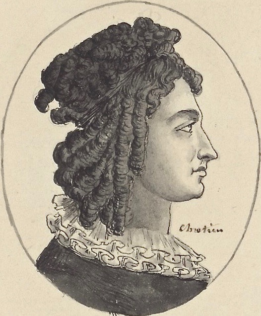 Chrétien: Die Sopranistin Mademoiselle Joinville. Tusche, Aquarell, 12 x 8 cm. Bibliothèque nationale de France.